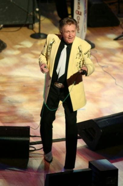 Ausschnitt von File:Bill Anderson (3461703442).jpg